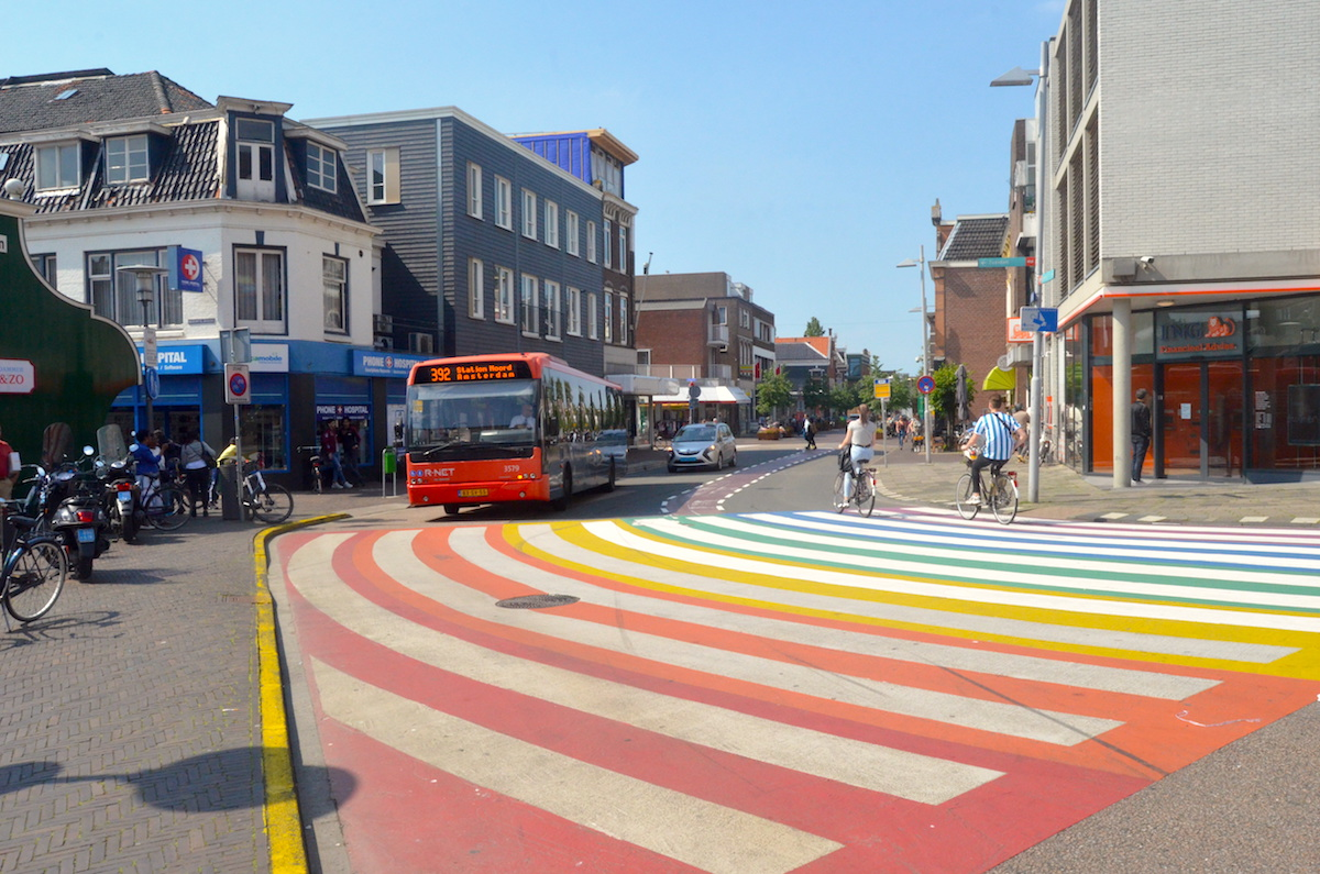 Regenboogpad Zaandam Gedempte Gracht; juni 2019. Foto: Erik Swierstra.